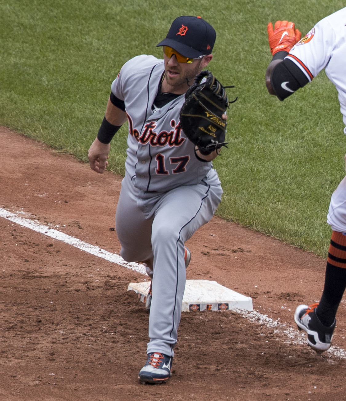 Tigers at Orioles 8/6/17